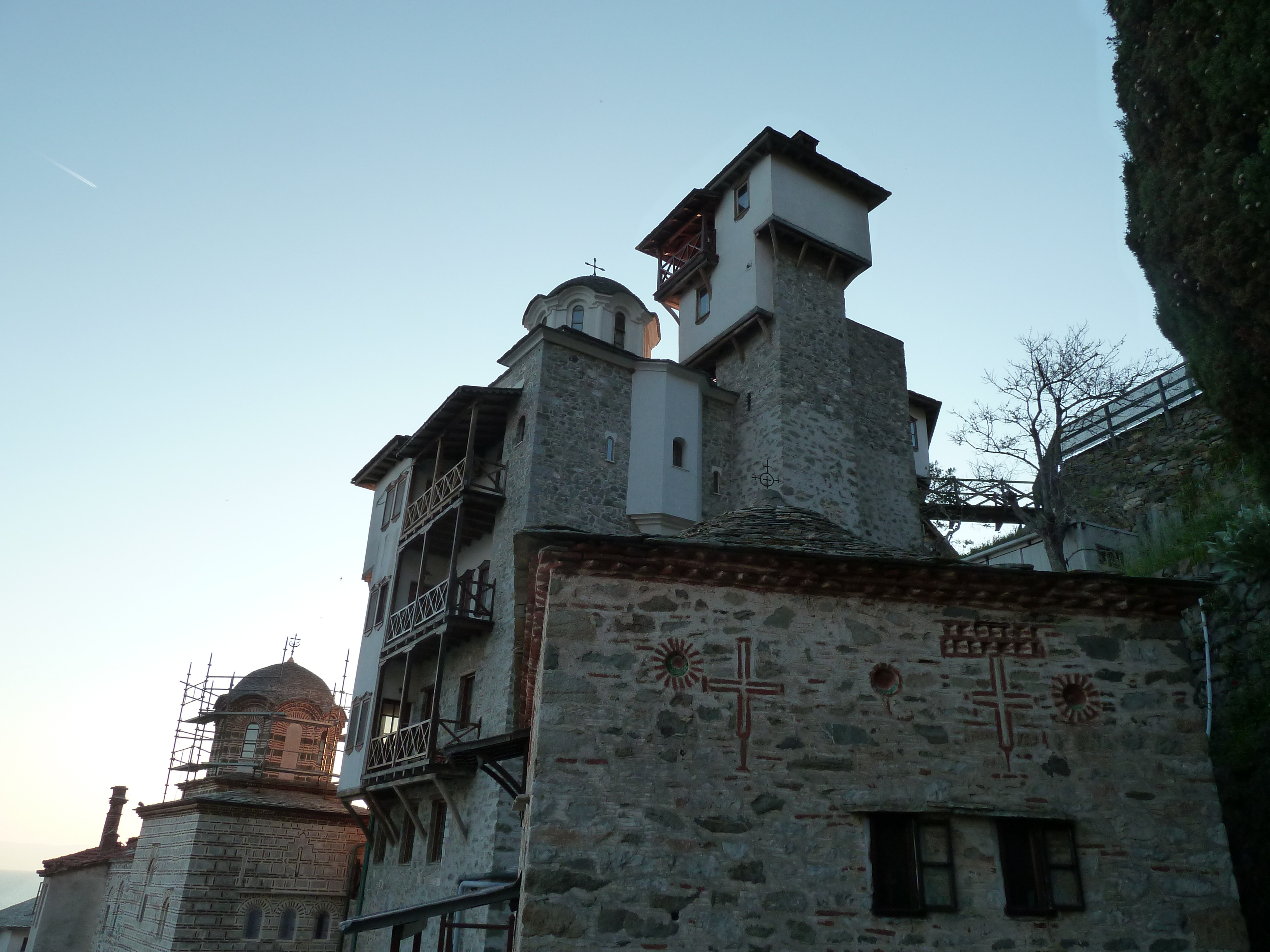 monastère de Grigoriou (Mont Athos)